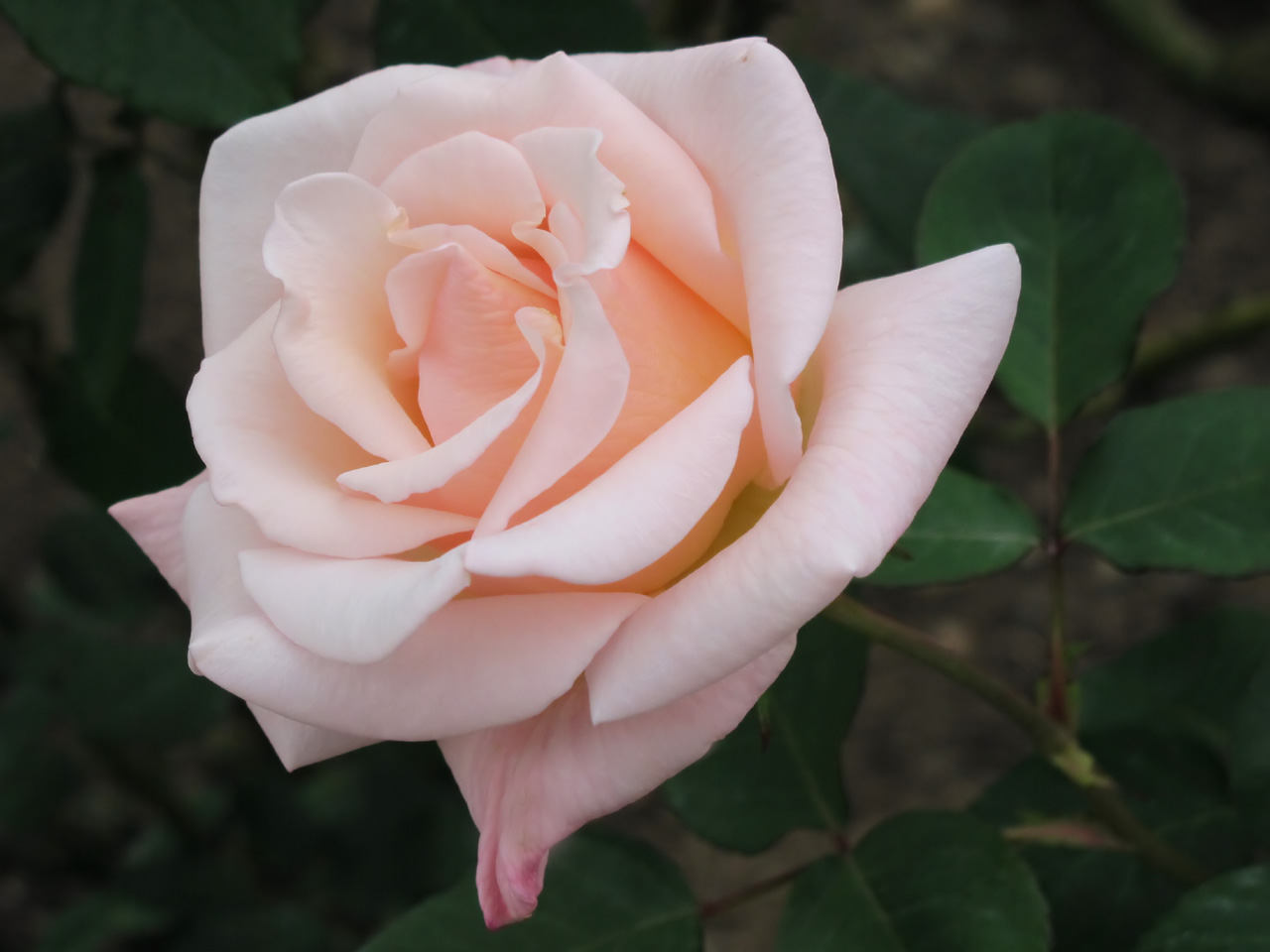 Hybrid Tea Rose ハイブリッドティー Madam Butterfly マダム バタフライ U.S.A. アメリカ Hill 1918